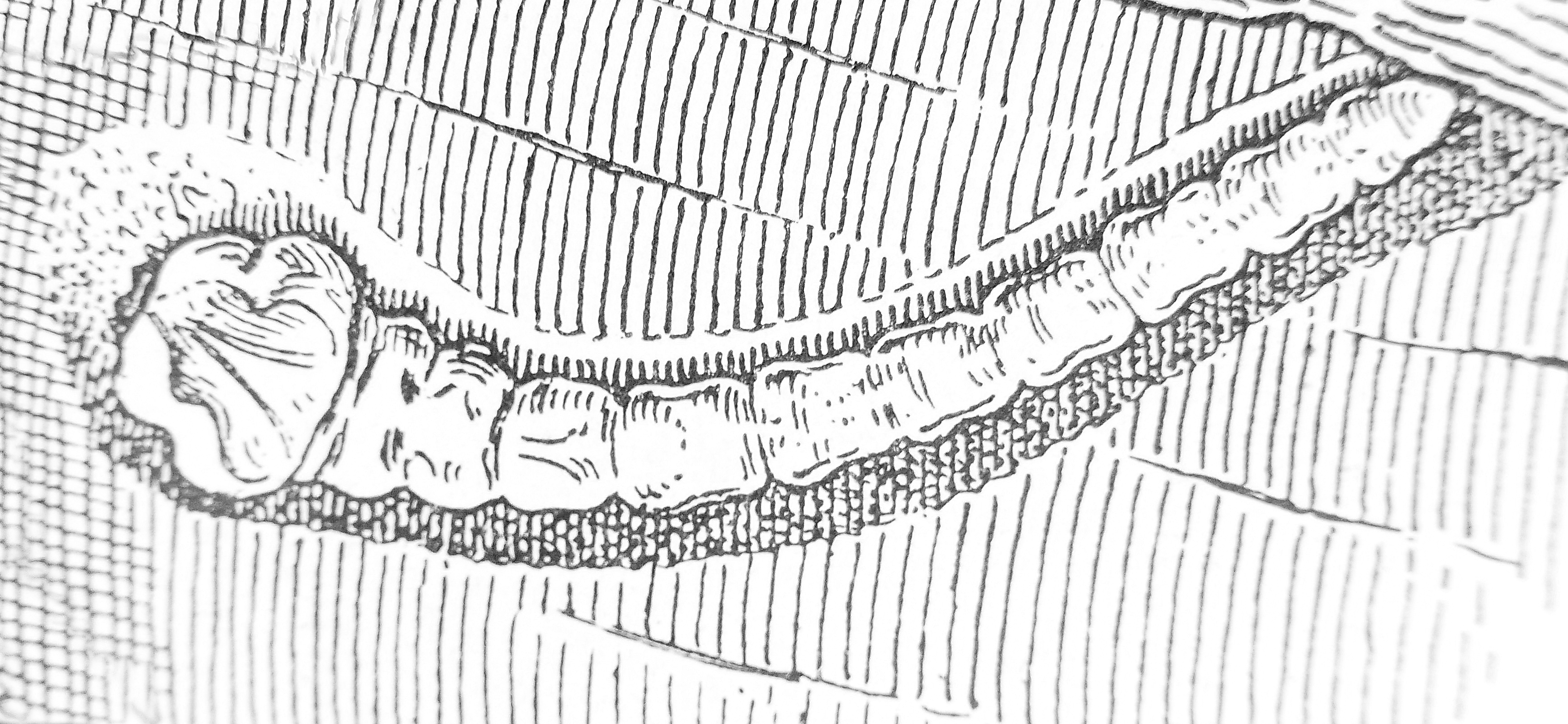 Dicerca berolinensis, Larve in Lindenholz nach Kurt Lampert, Bilder aus dem Käferleben, Stuttgart, Verlag Strecker & Schröder 1909